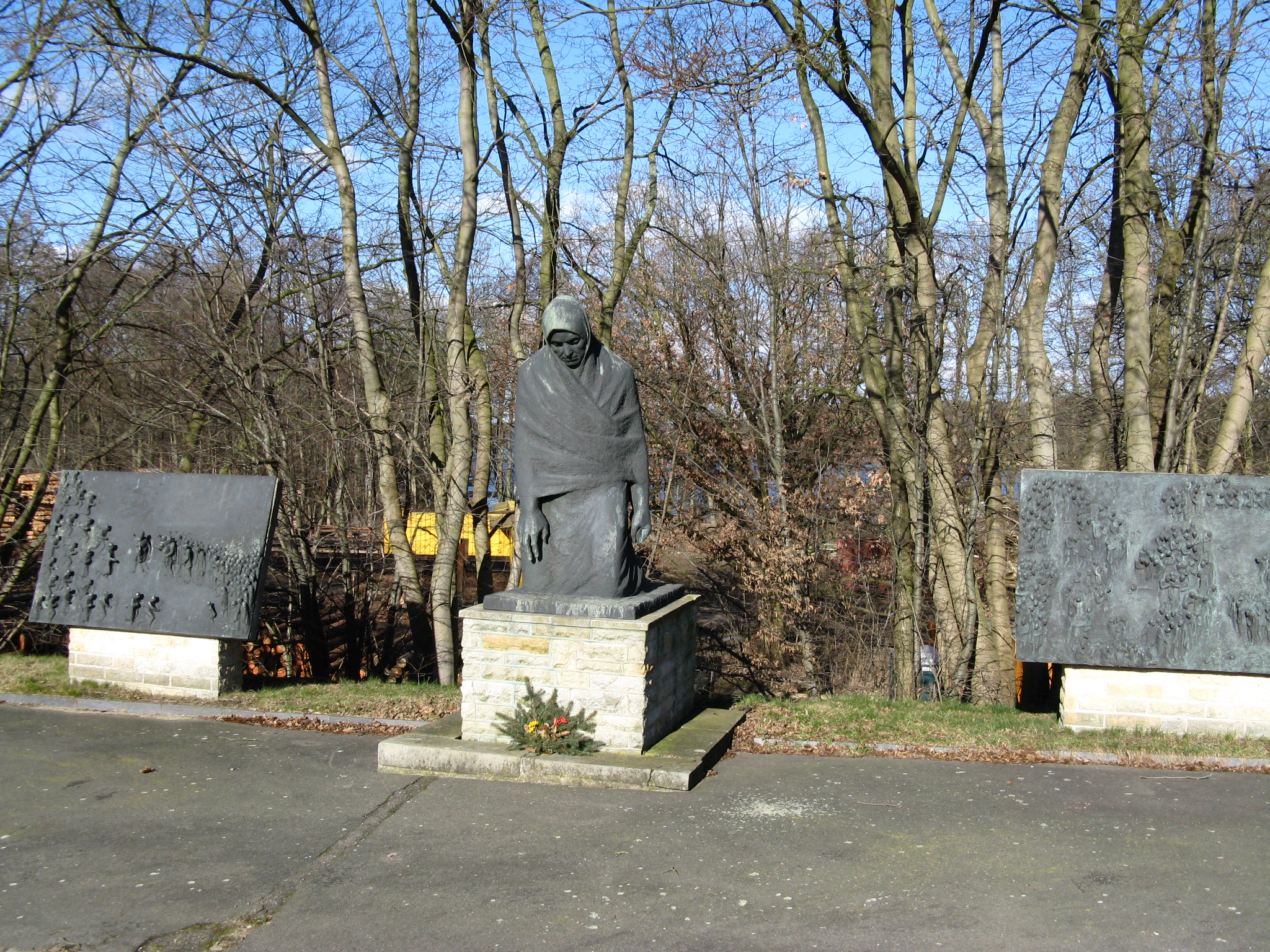 Mahn- und Gedenkstätte in Raben Steinfeld von 1973 mit der Monumentalplastik von Bildhauer Gerhard Thieme "Die Mutter", daneben zwei der vier Reliefstelen des gleichen Künstlers von 1976